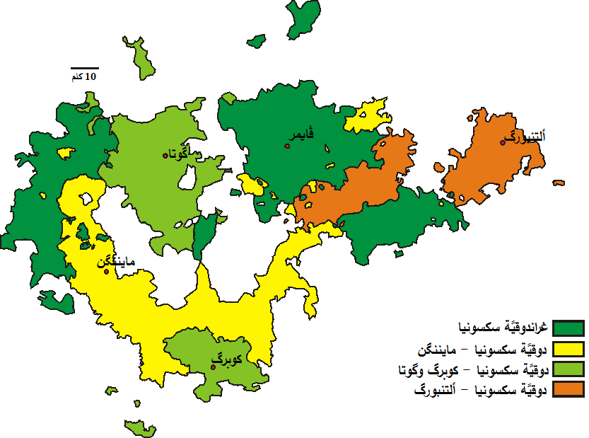 خريطة الدوقيَّات الإرنستيَّة.